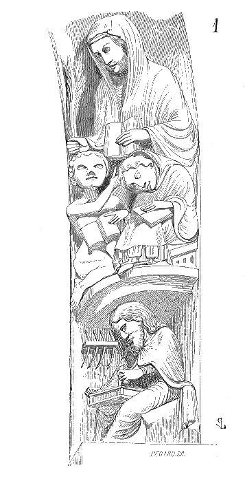 La porte de droite de la façade occidentale de la cathédrale de Chartres présente, sculptés dans ses voussures, les arts libéraux. La sculpture ci-contre représente la grammaire.